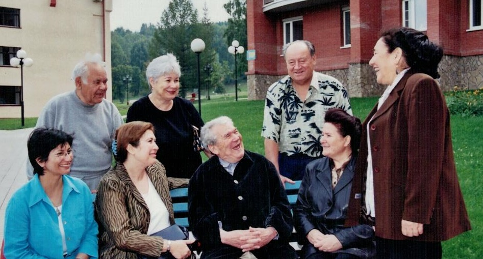 Шағир Мостай Кәрим менән. Красноусольск шифаханаһы. 2003